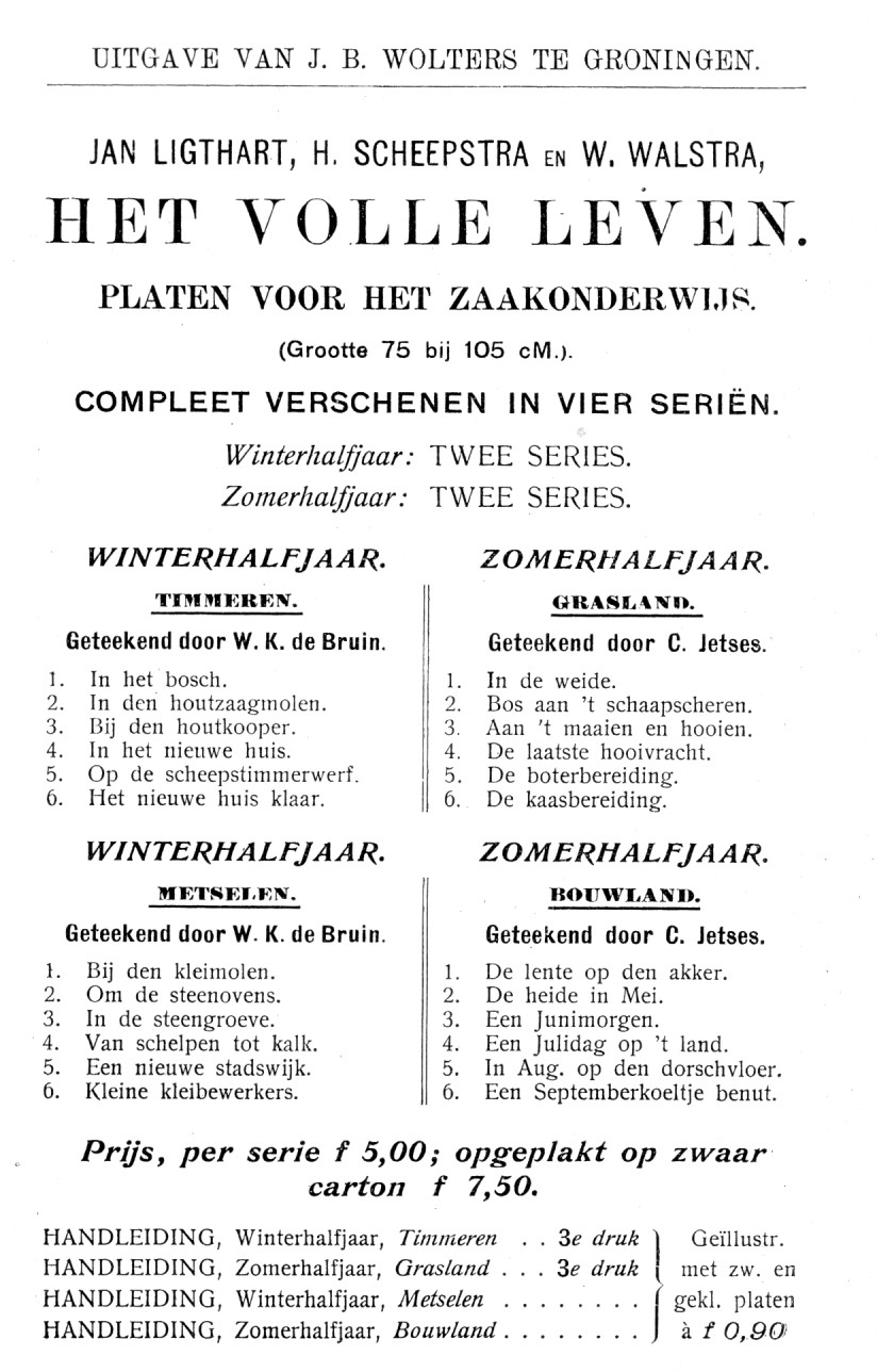 Advertentie voor boekjes Het volle Leven